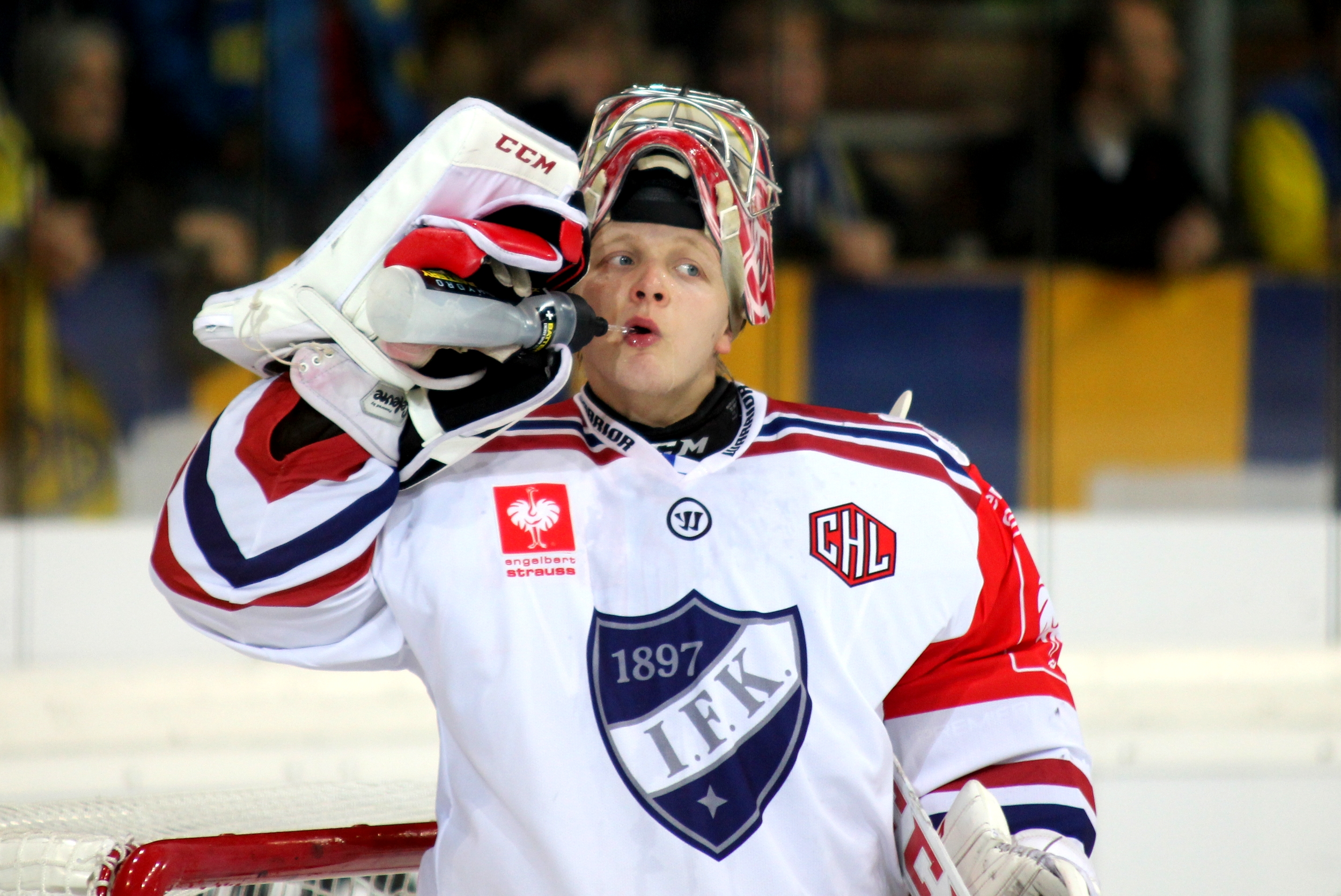 Ville Husso (H 34).